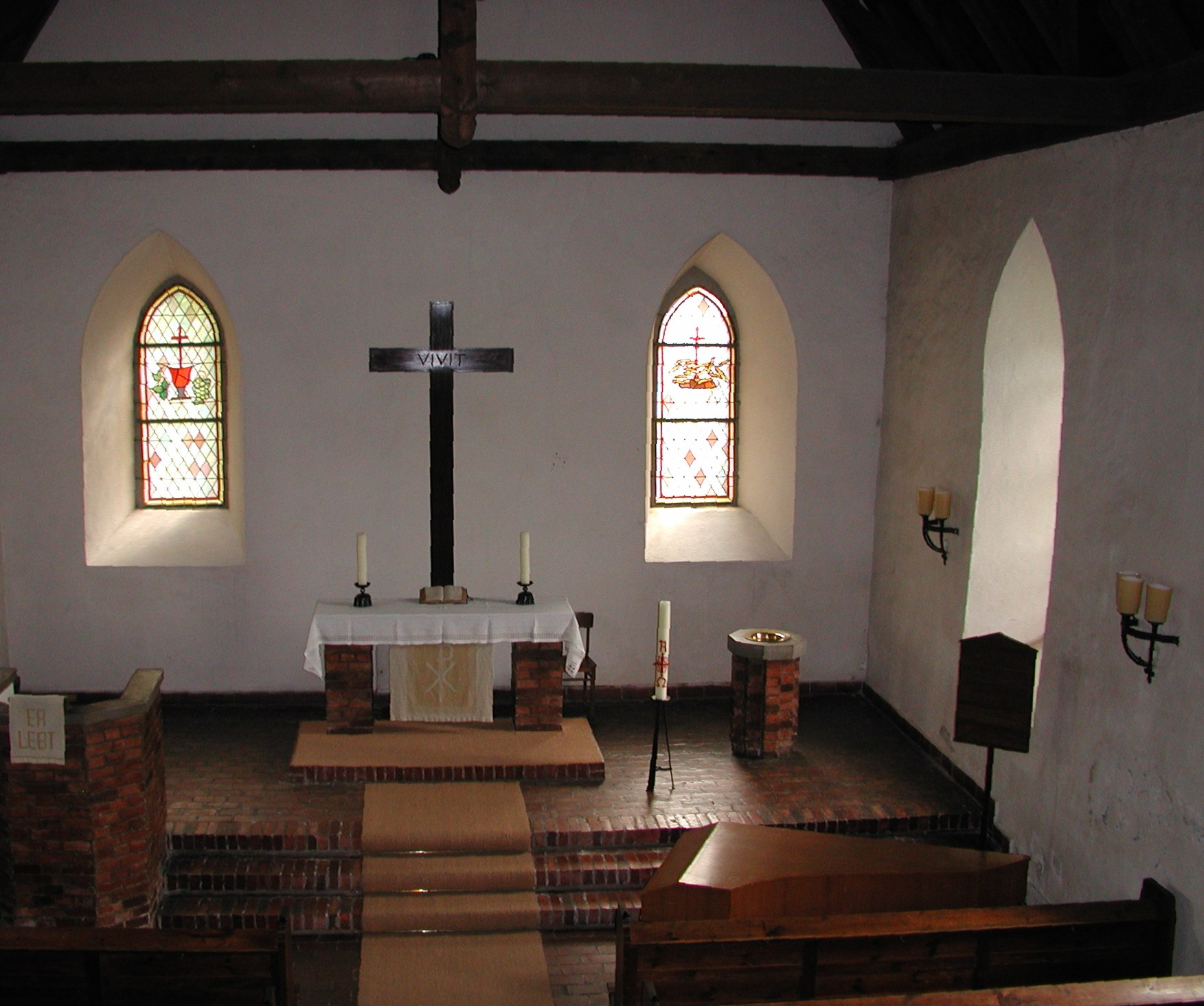 Blick in das Innere der Lichtenberger Dorfkirche